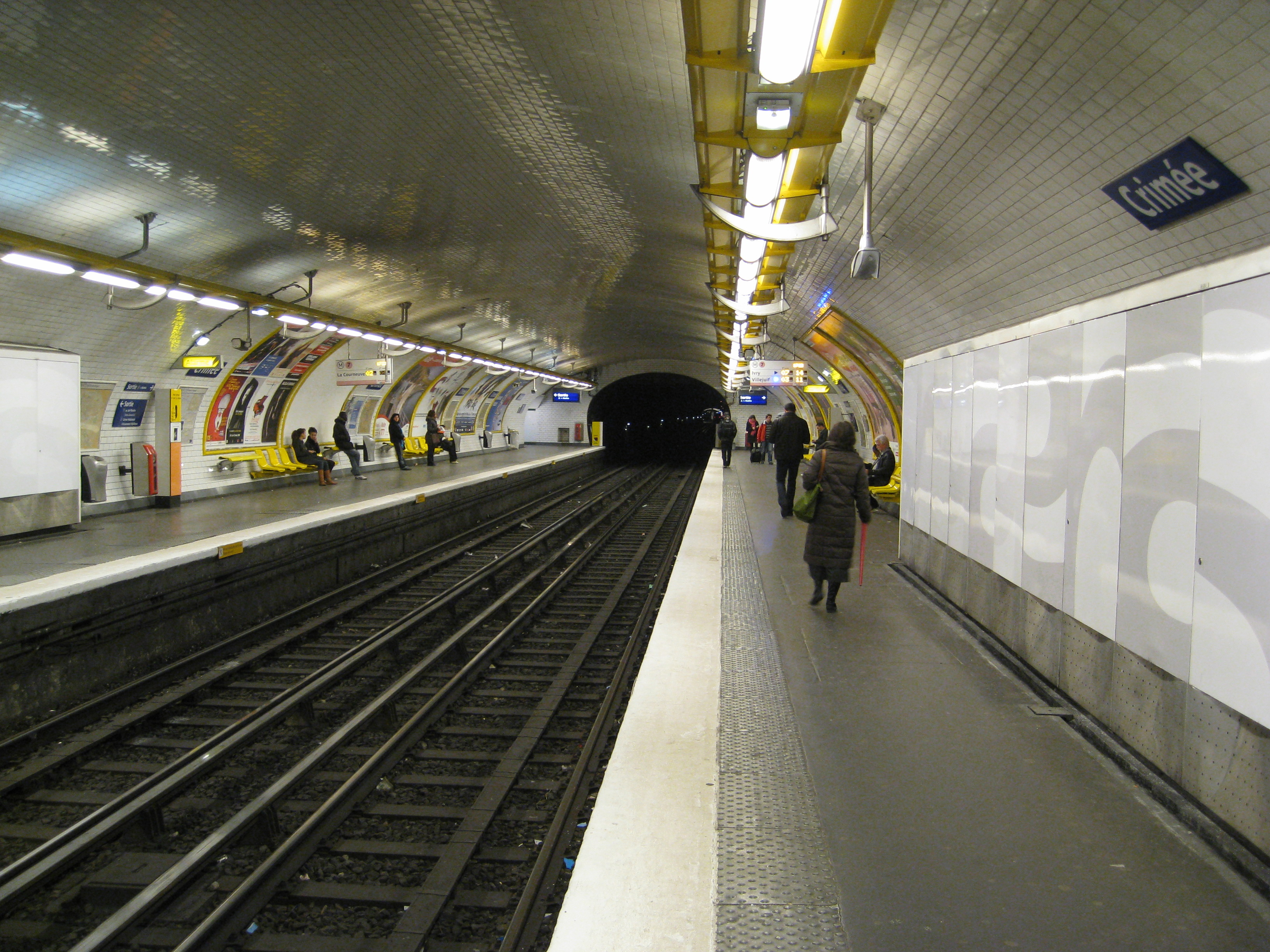 Station Crimée, ligne 7 du métro de Paris, France.